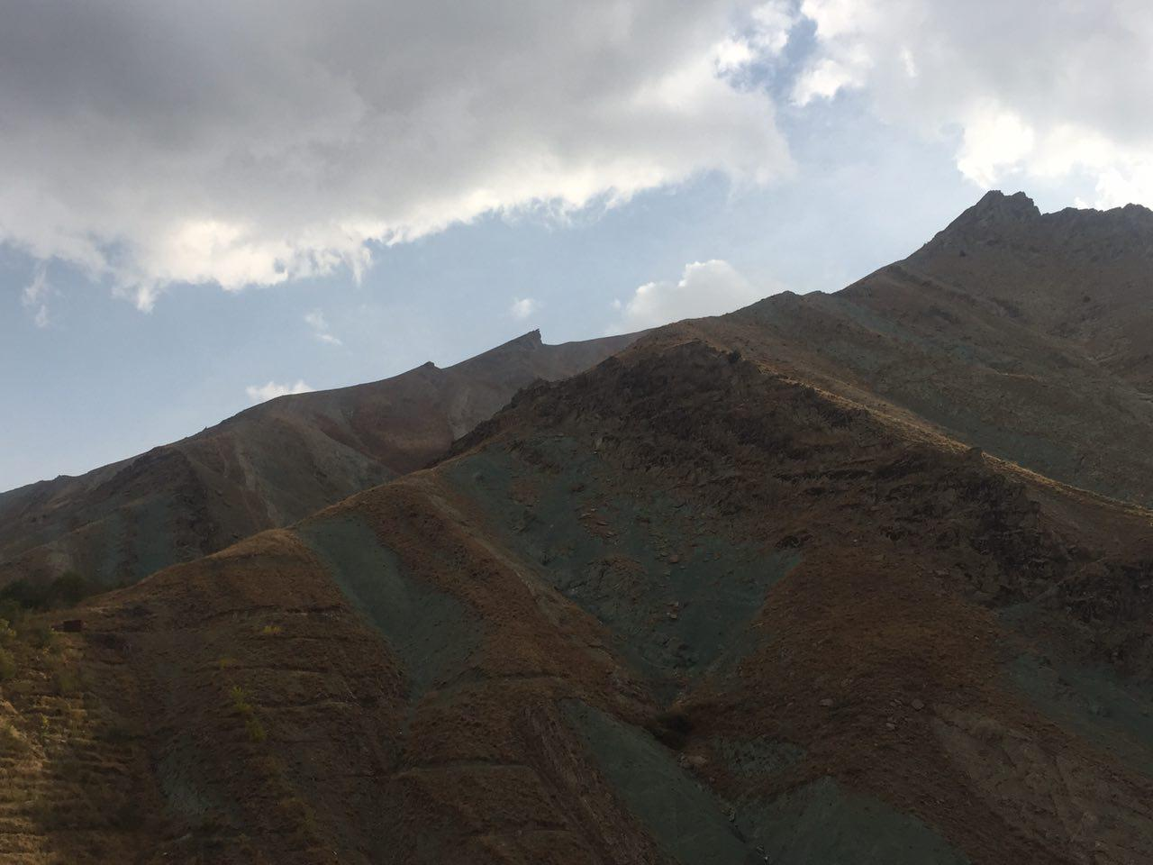 کوههای اطراف دهستان امامه